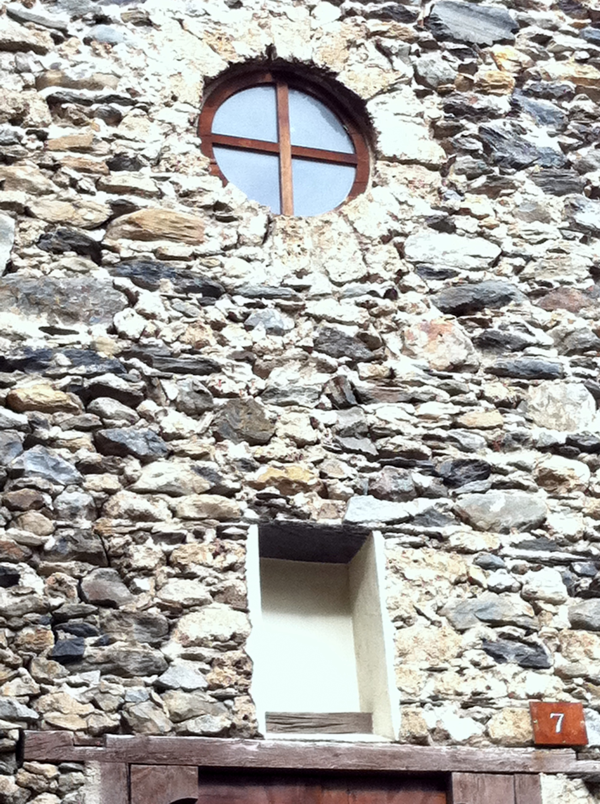 Capella de casa Rossell